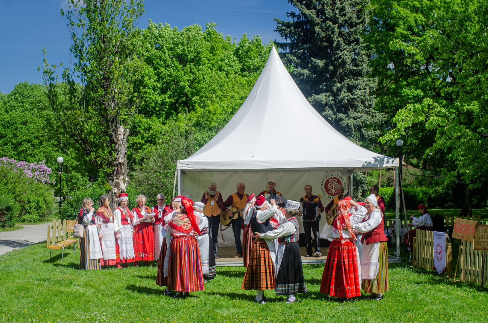 Tallinnas Folklooripeol ,,Baltica""